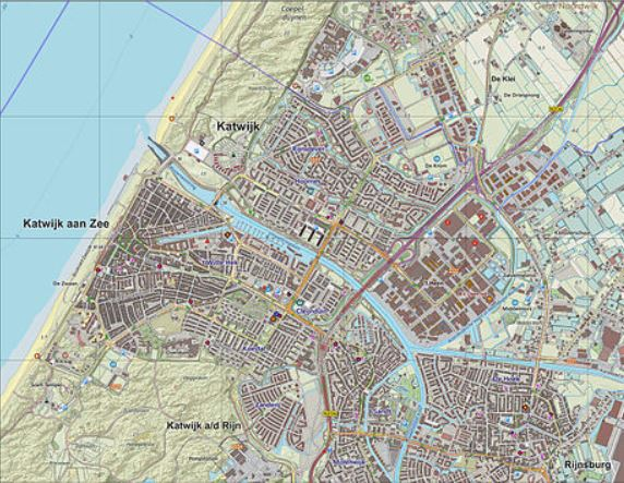 Topographie de Katwijk aan Zee et de ses environs.